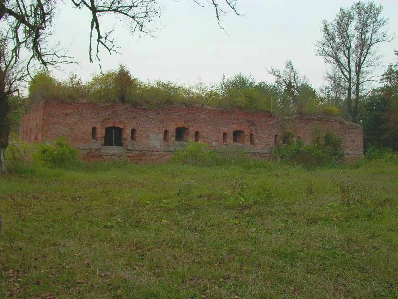 Fotografia przedstawia widok ogólny działobitni porucznika K. Kołaczkowskiego w Koronie Utrackiej Twierdzy Modlin. Stan na jesień 2004.